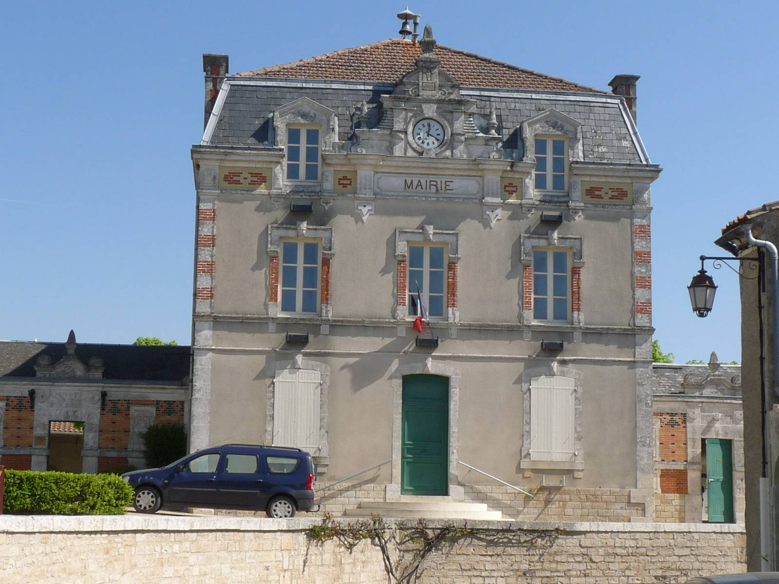 Mairie de Villejésus, Charente, France